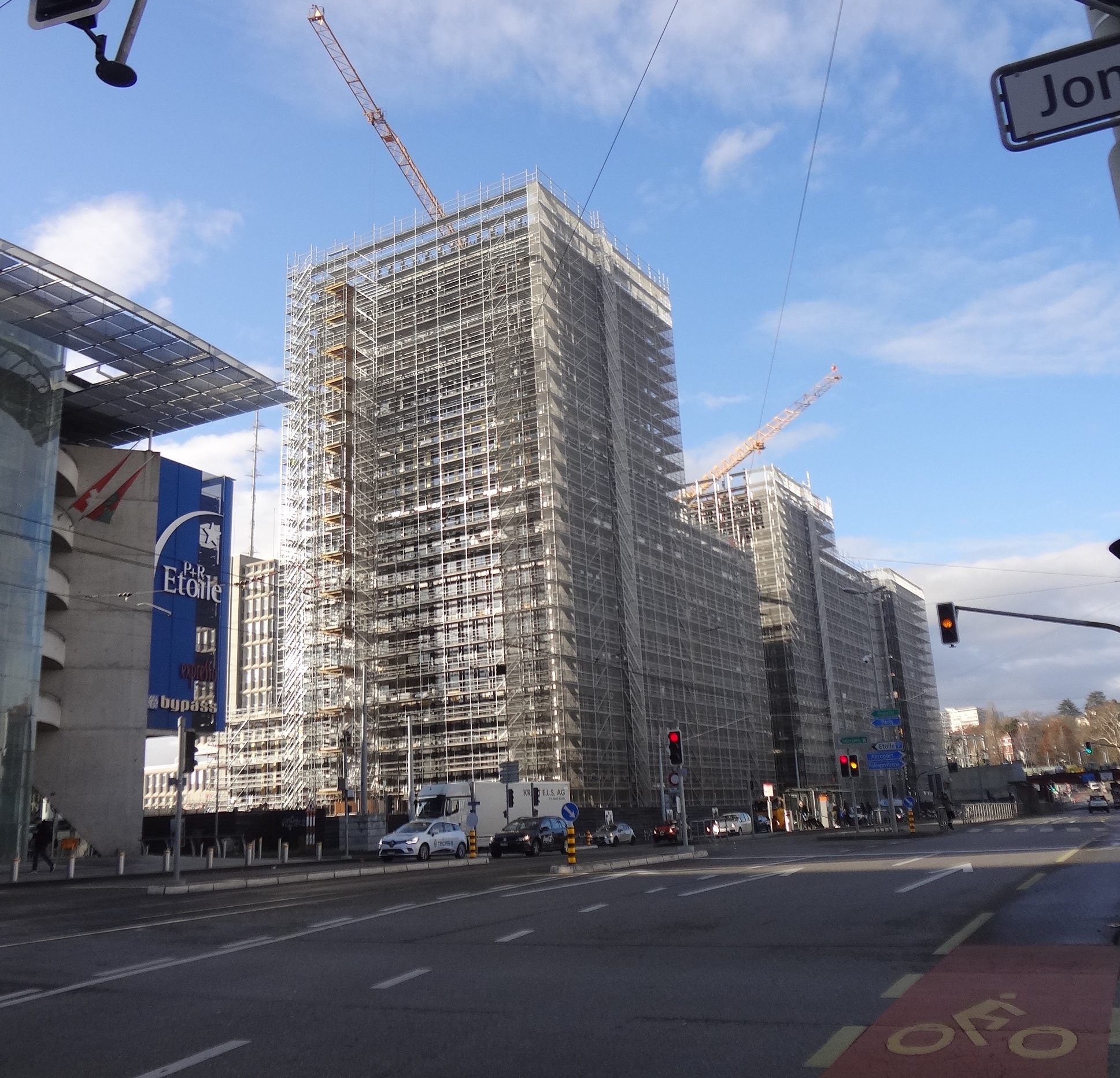 Tours en construction autour de "Lancy-Pont-Rouge", première grande réalisation du projet Praille - Acacias - Vernets (PAV).